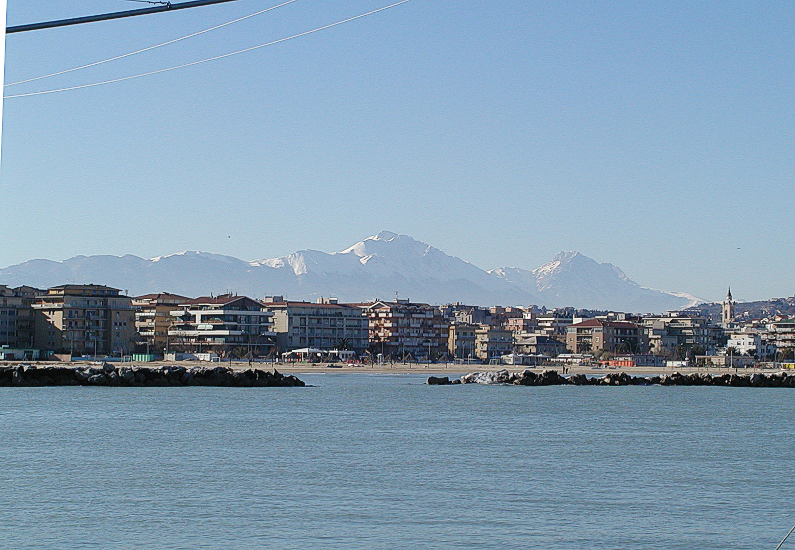 "La Bella Addormentata" die schlafende Schönheit geformt von den Bergen des Gran Sasso und die Innenstadt von Pescara im Vordergrund